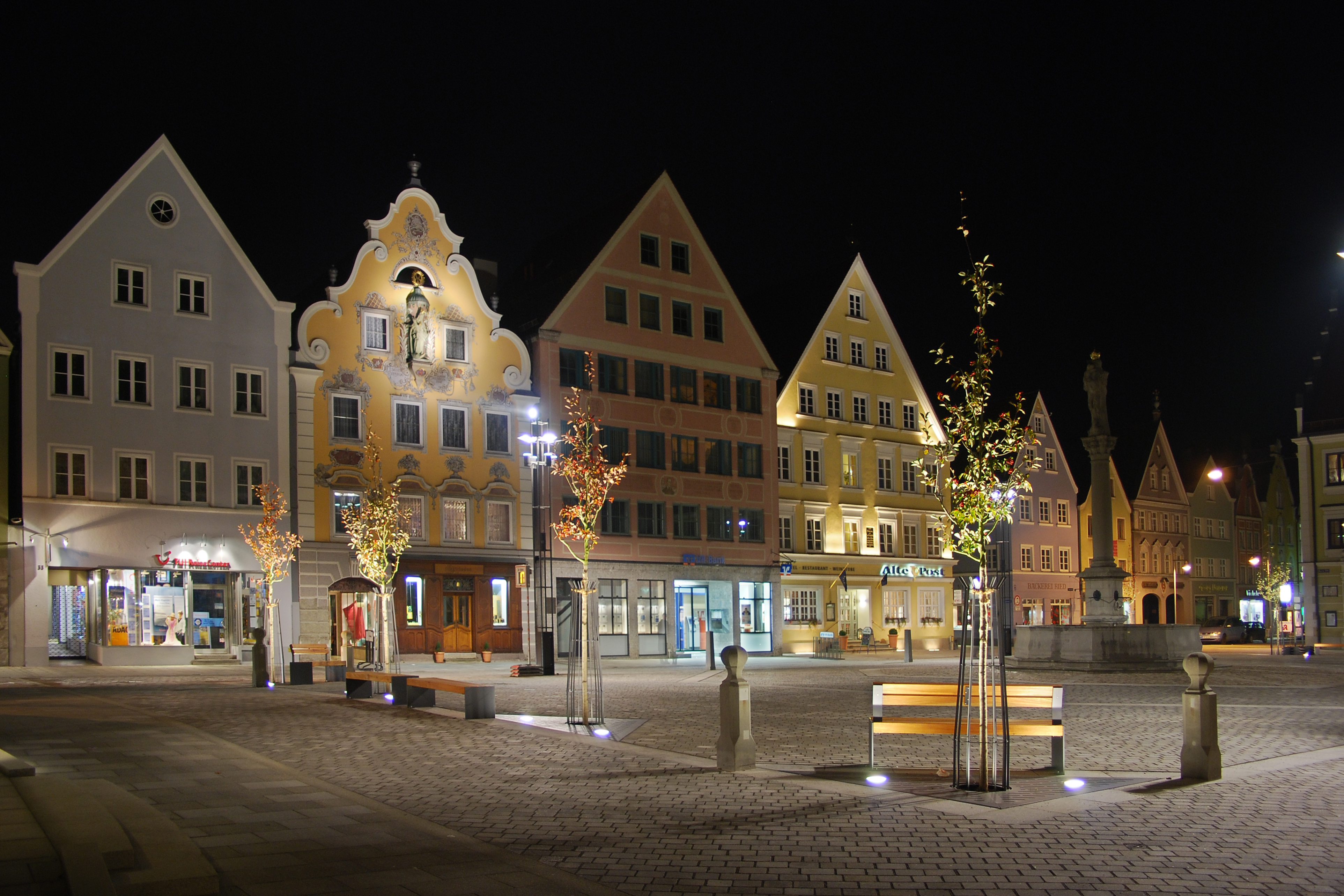 Der "neue" Marienplatz (nach der Umgestaltung) in Mindelheim.